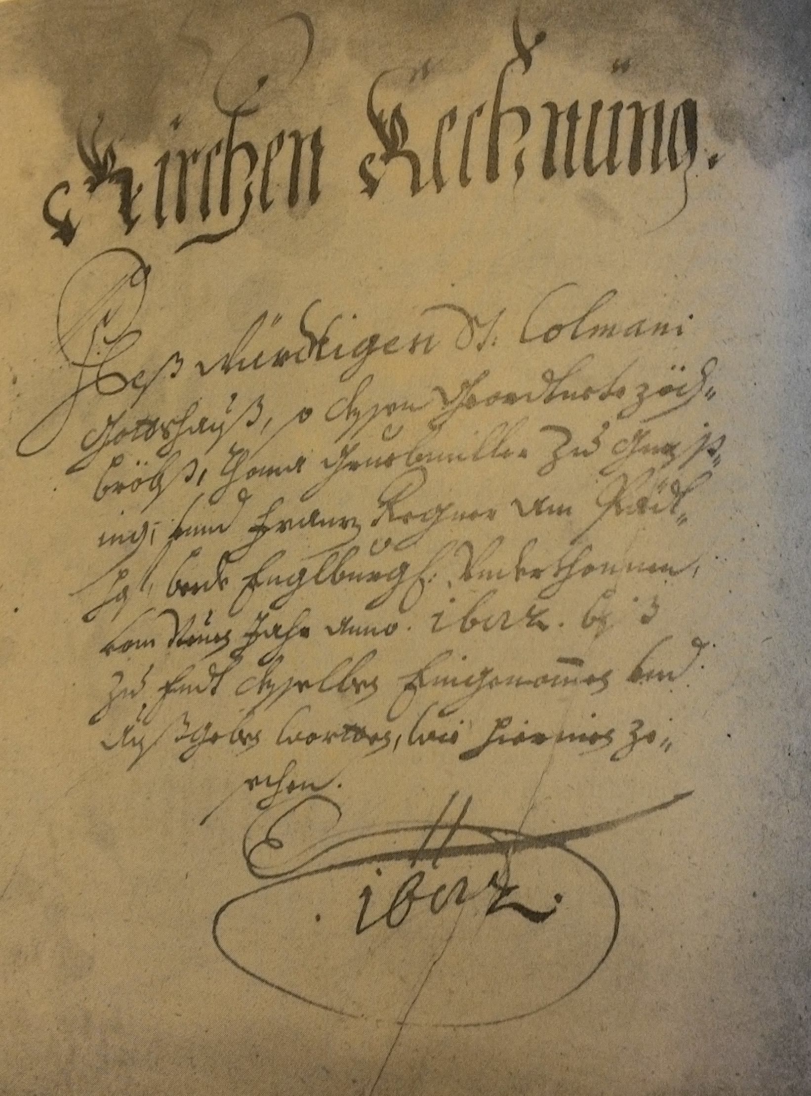 Kirchenrechnung von 1600, St. Kolomann (Neukirchen vorm Wald)